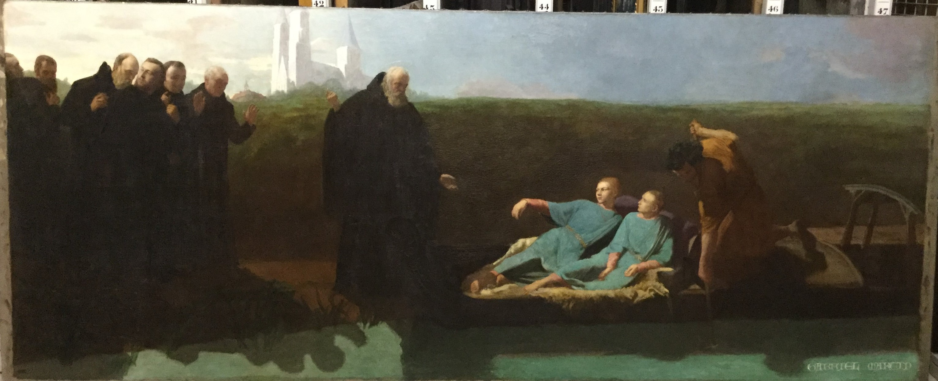 Tableau de Gabriel Martin, restauré par les ateliers du Musée des Beaux-Arts.